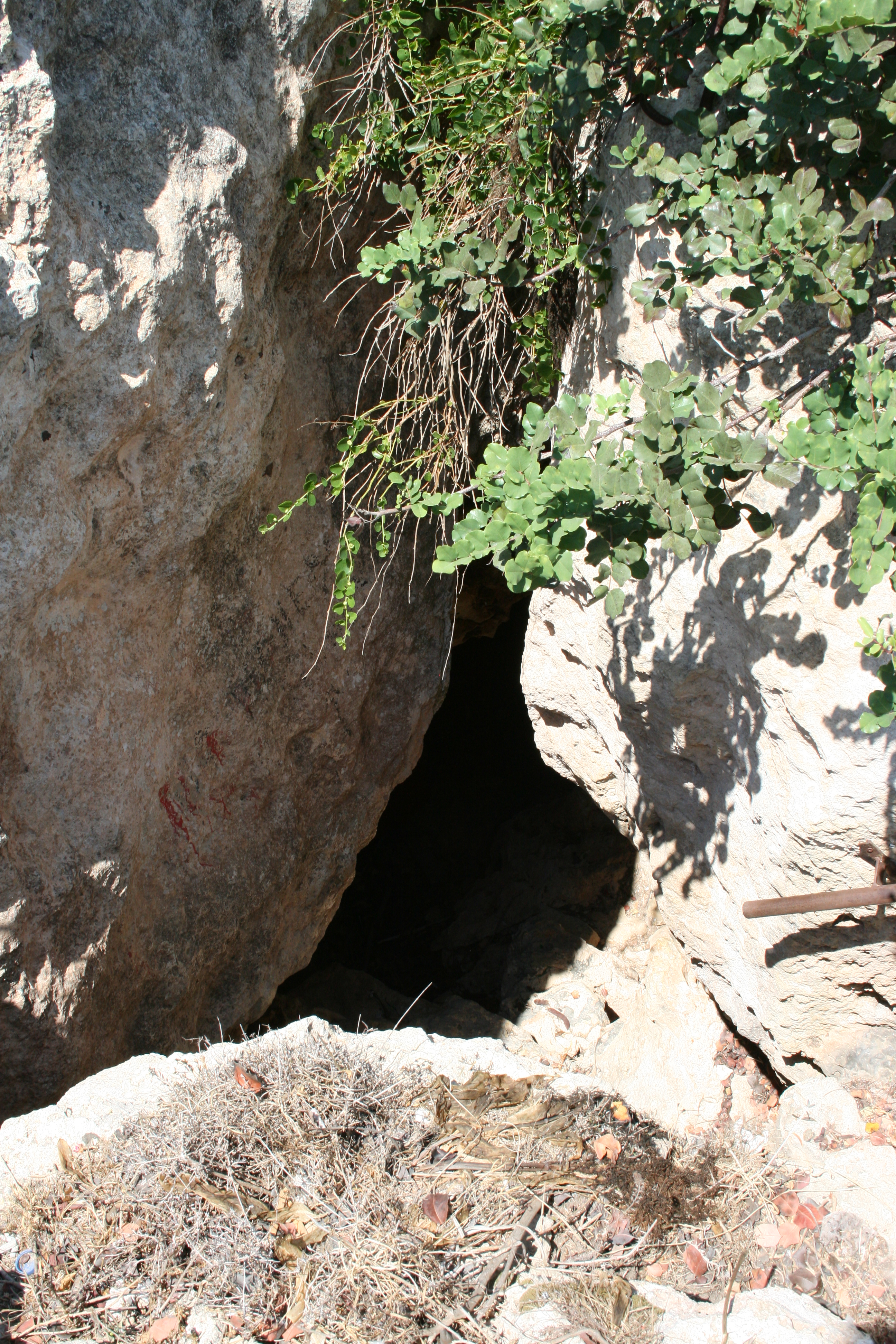 Kalypsohöle